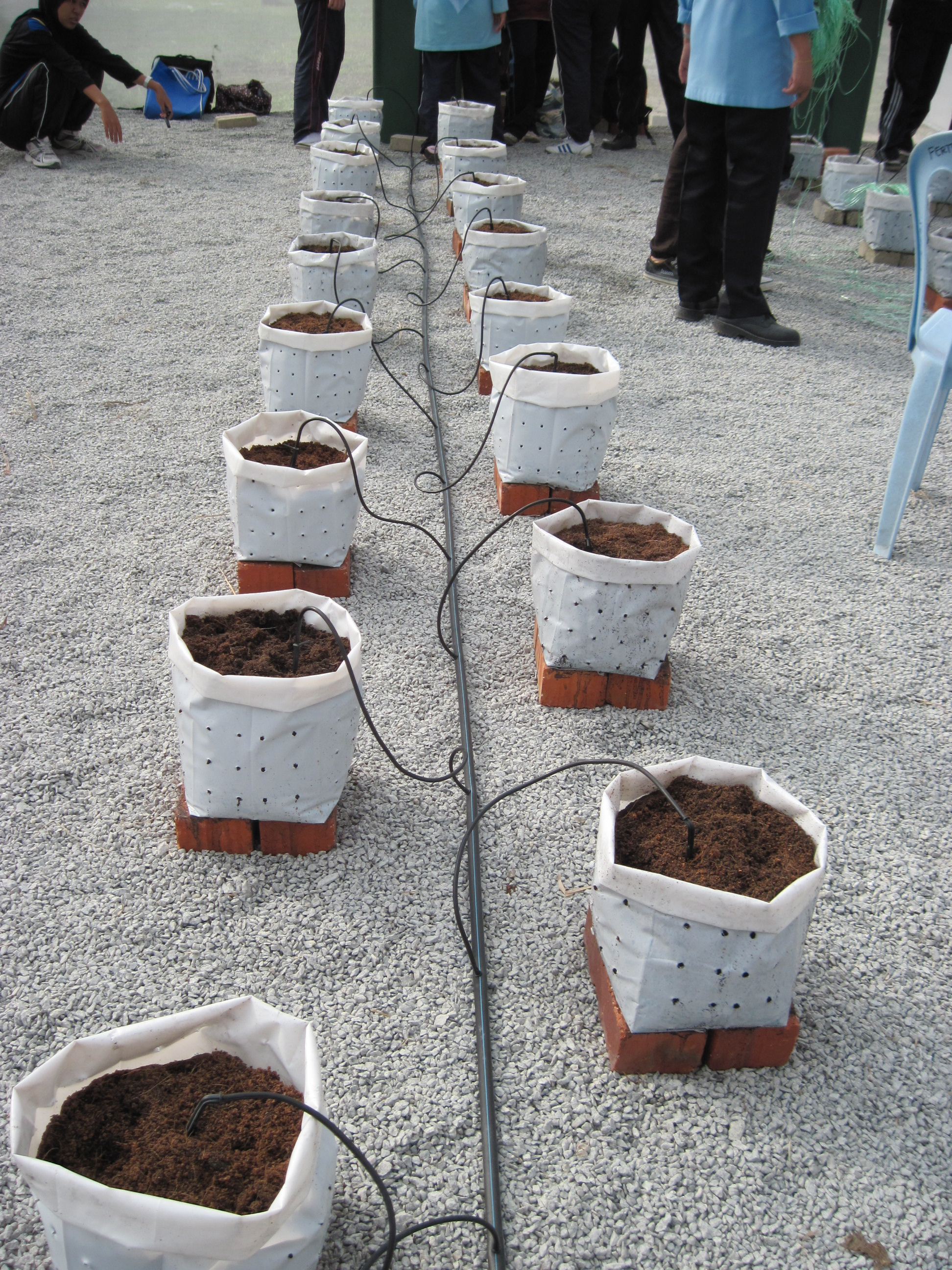 Polibeg putih fertigasi.